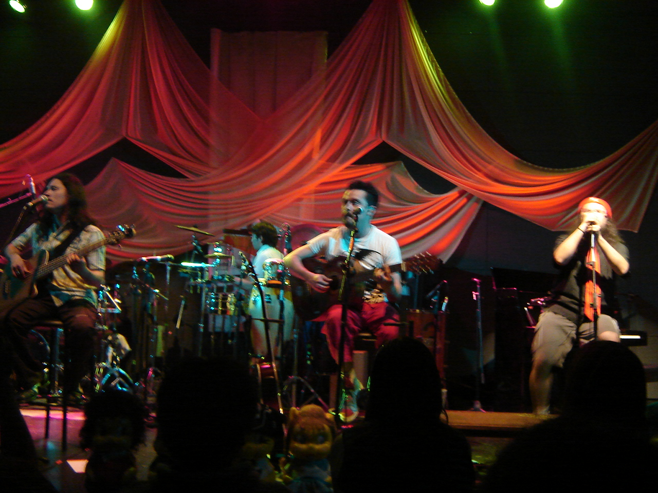 La banda chilena Chancho en Piedra presentándose en la sala de la Sociedad de Derecho de Autor (SCD).